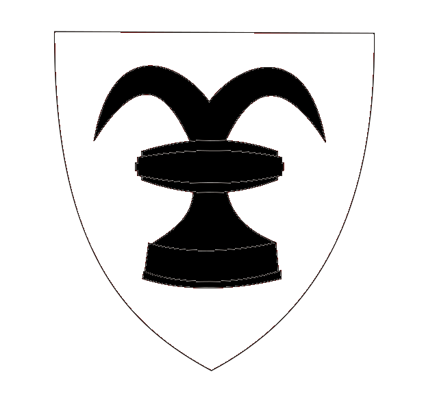 herb Roch (Pierzchała) według Roli marszałkowskiej z 1461 r.